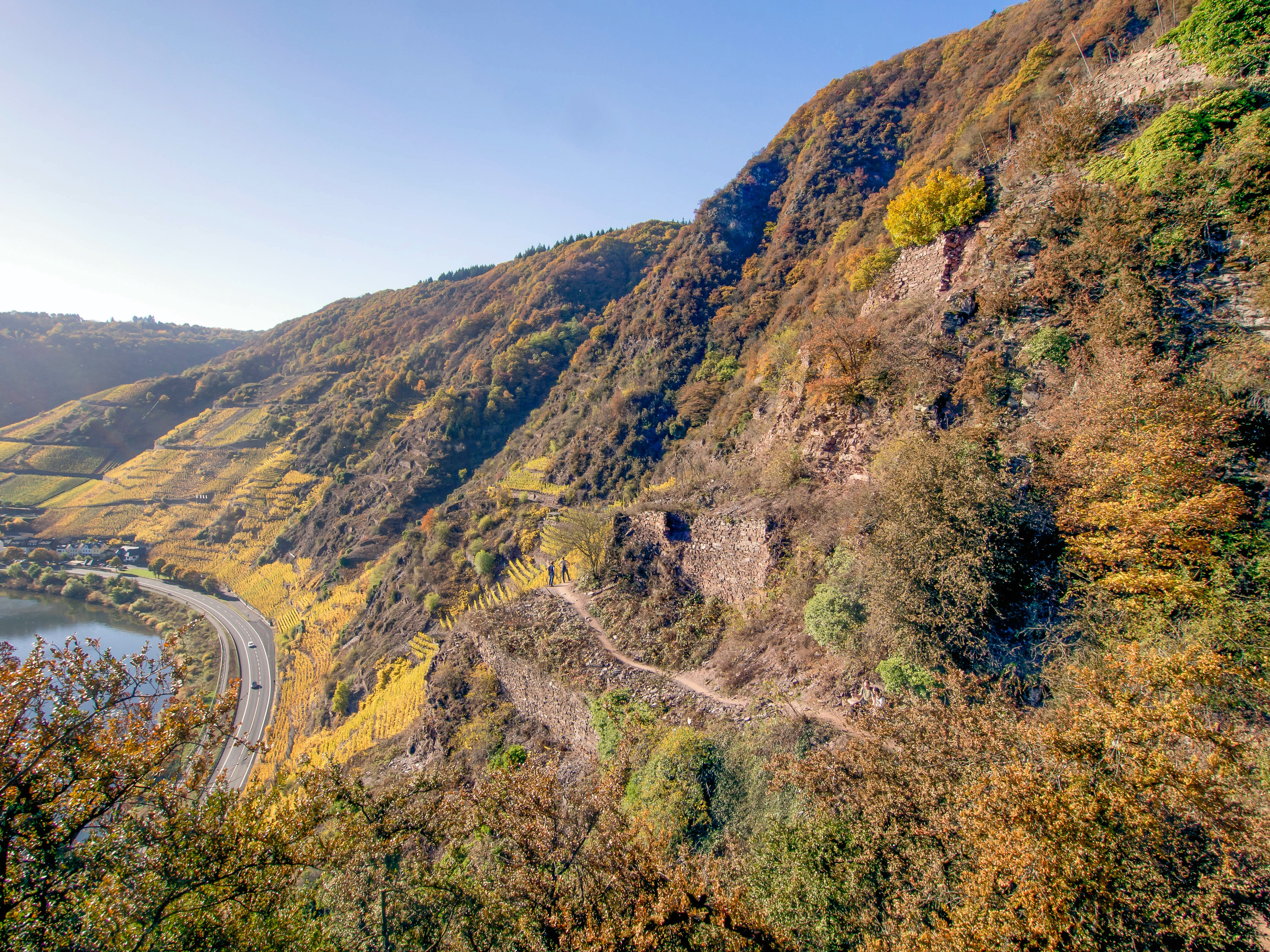 Unterwegs auf dem Calmont-Klettersteig im Goldenen Oktober